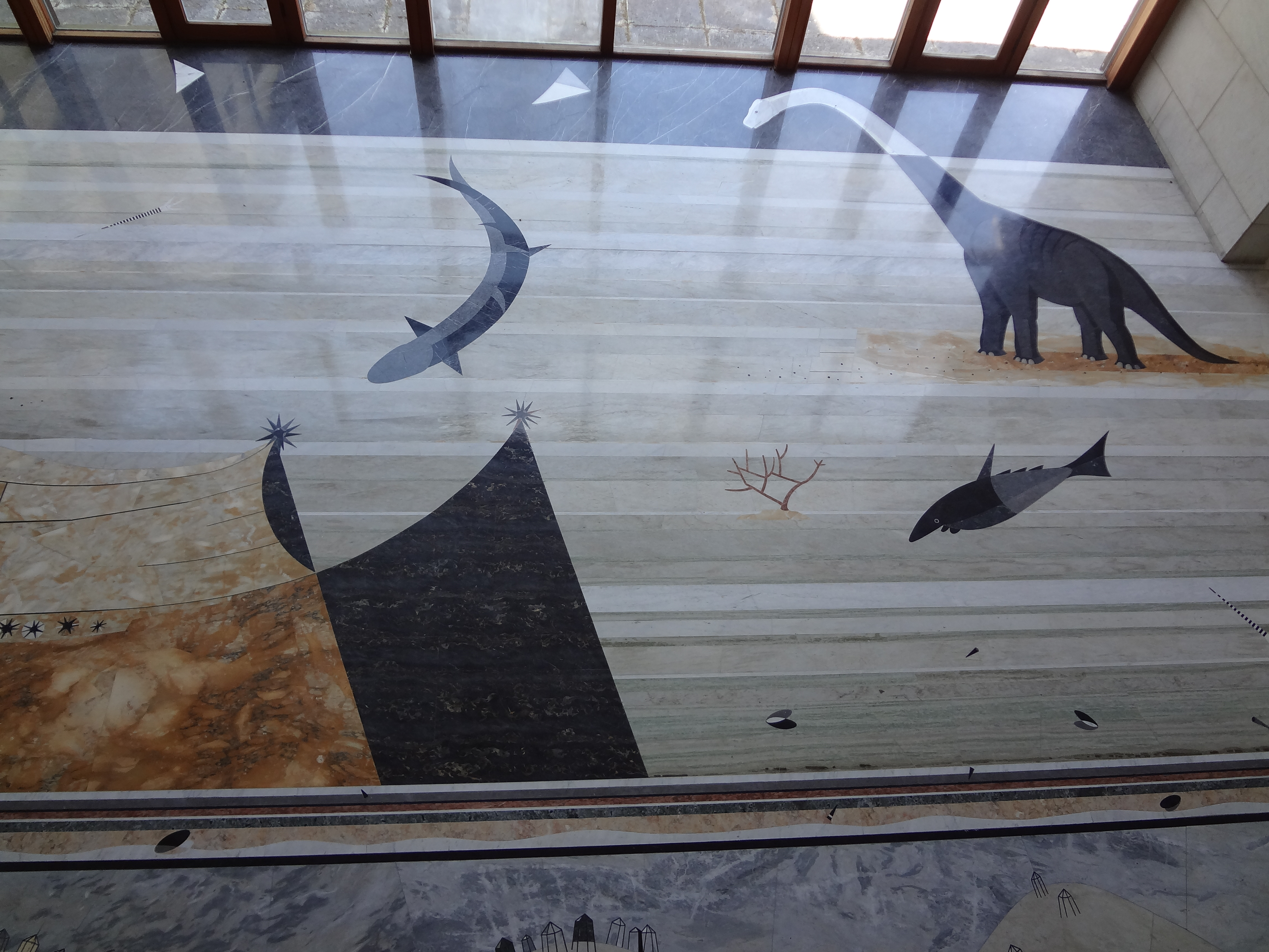 Marmorgolvet norra byggnaden från ovanvåningen